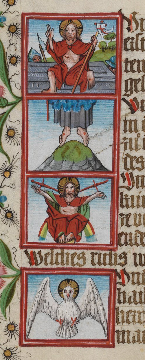 Detail aus dem Waldburg-Gebetbuch, WLB Stuttgart, Cod. brev. 12, fol. 80v